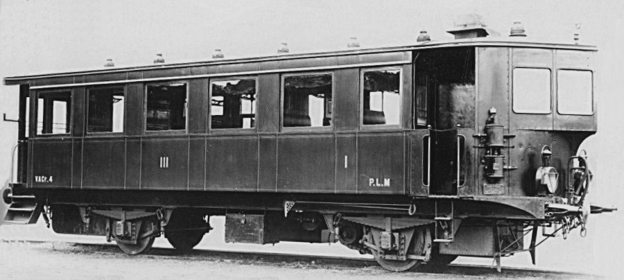 Automotrice à vapeur Purrey VACf4 du PLM, 1905. Compound 4 cylindres (140 x 200 mm & 200 x 200 mm) grille 0,82 m², 20 kg/cm², 12 places en 1re & 36 places en 2e, 27 t, 12,4 m, 60 km/h.